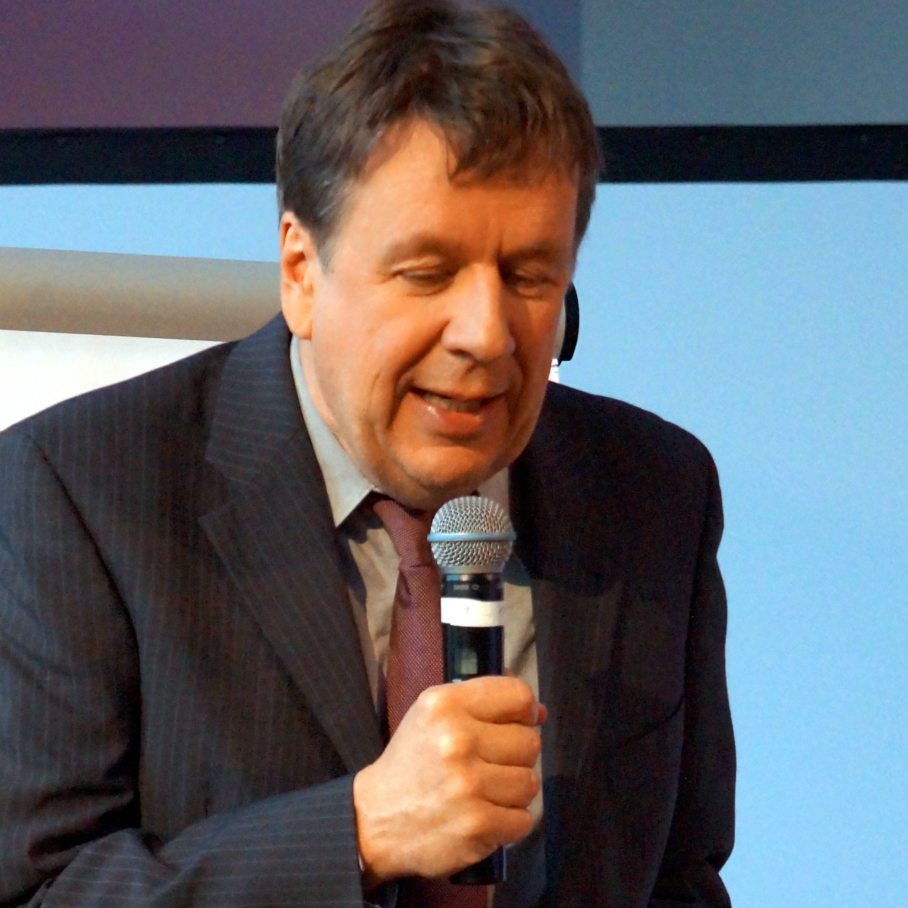 Meteorologe Jörg Kachelmann bei einem Auftritt im April 2016 in Erbach im Odenwald